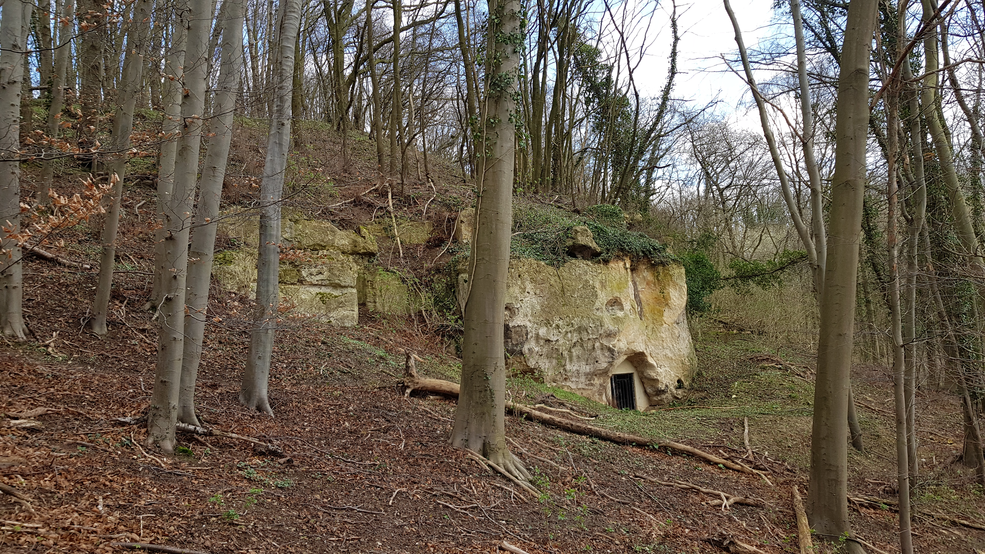 Mosterdberggroeve Noord, Cadier en Keer, Nederland